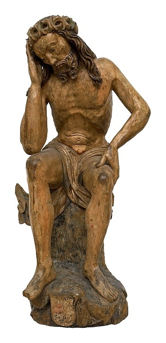 Odpočívající Kristus ze Seebergu, s donátorkou z rodu Zedwitzů (kolem r. 1509)